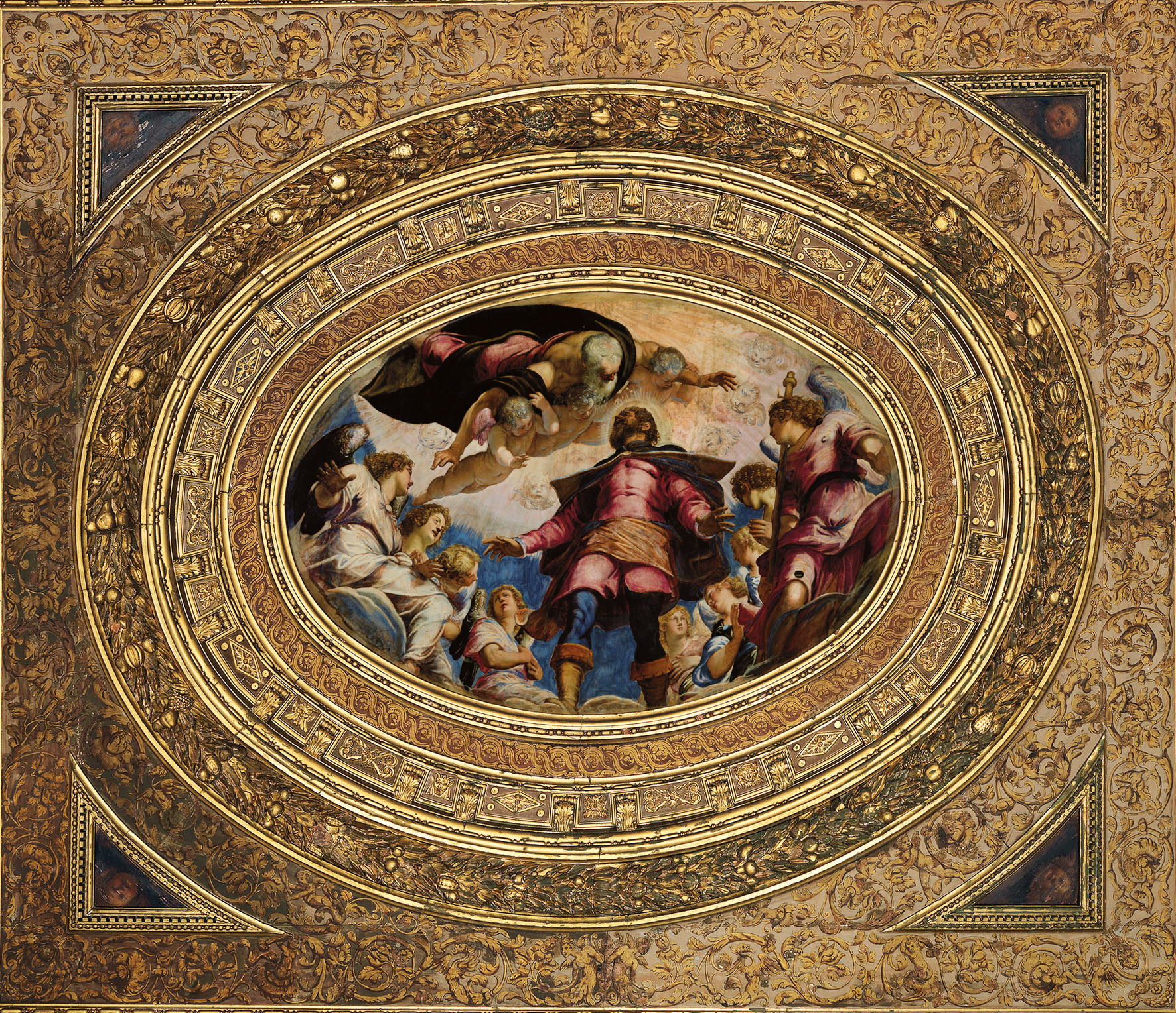 Jacopo Tintoretto - Glorification of St Roch